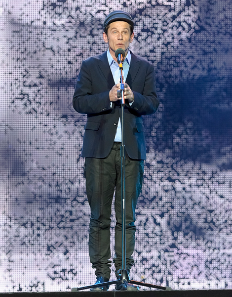 Фестиваль и премия «Золотая маска» 2012 года